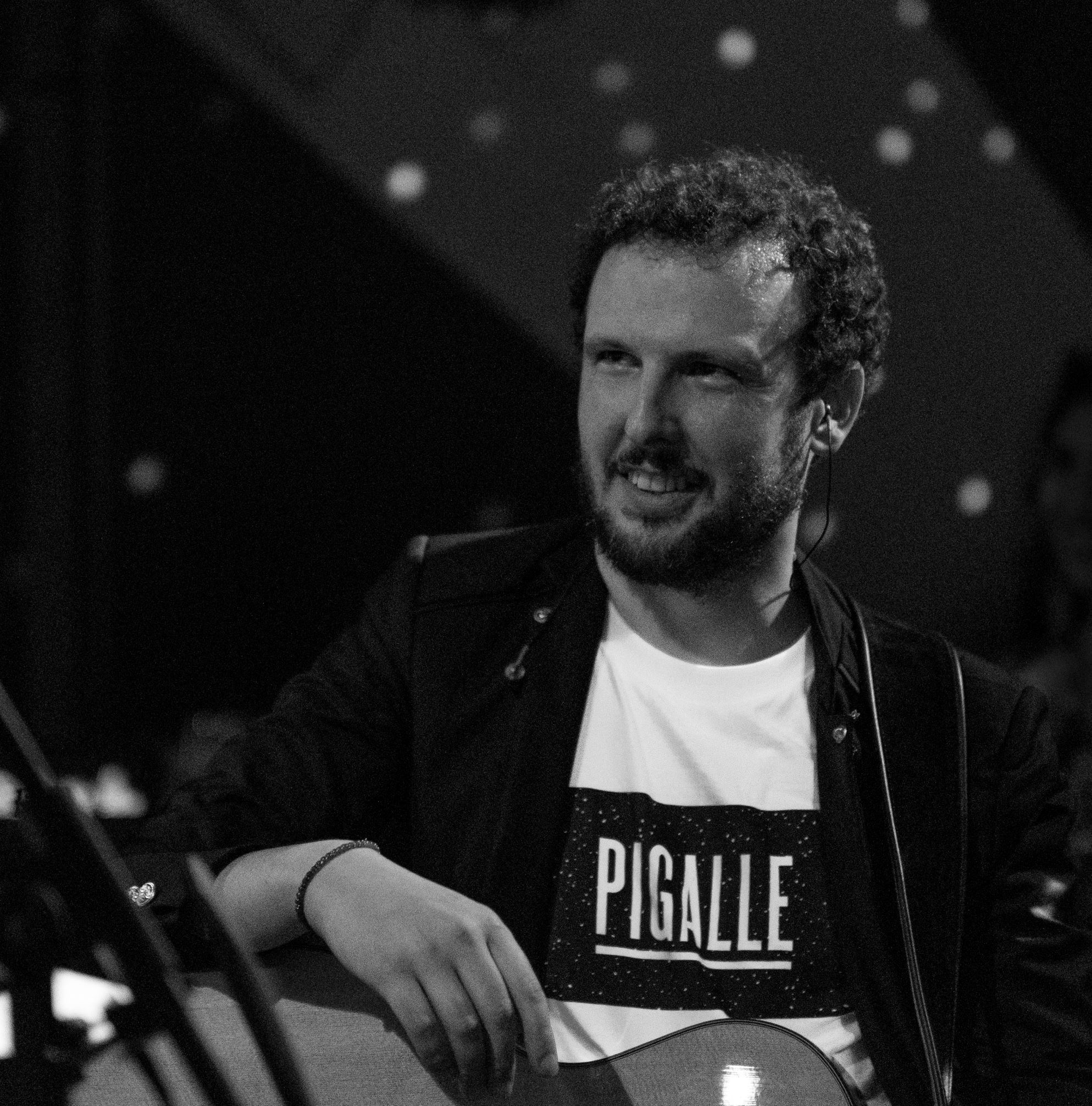 Elias Bertini durante il concerto di fine anno all'Osteria La Fabbrica di Losone